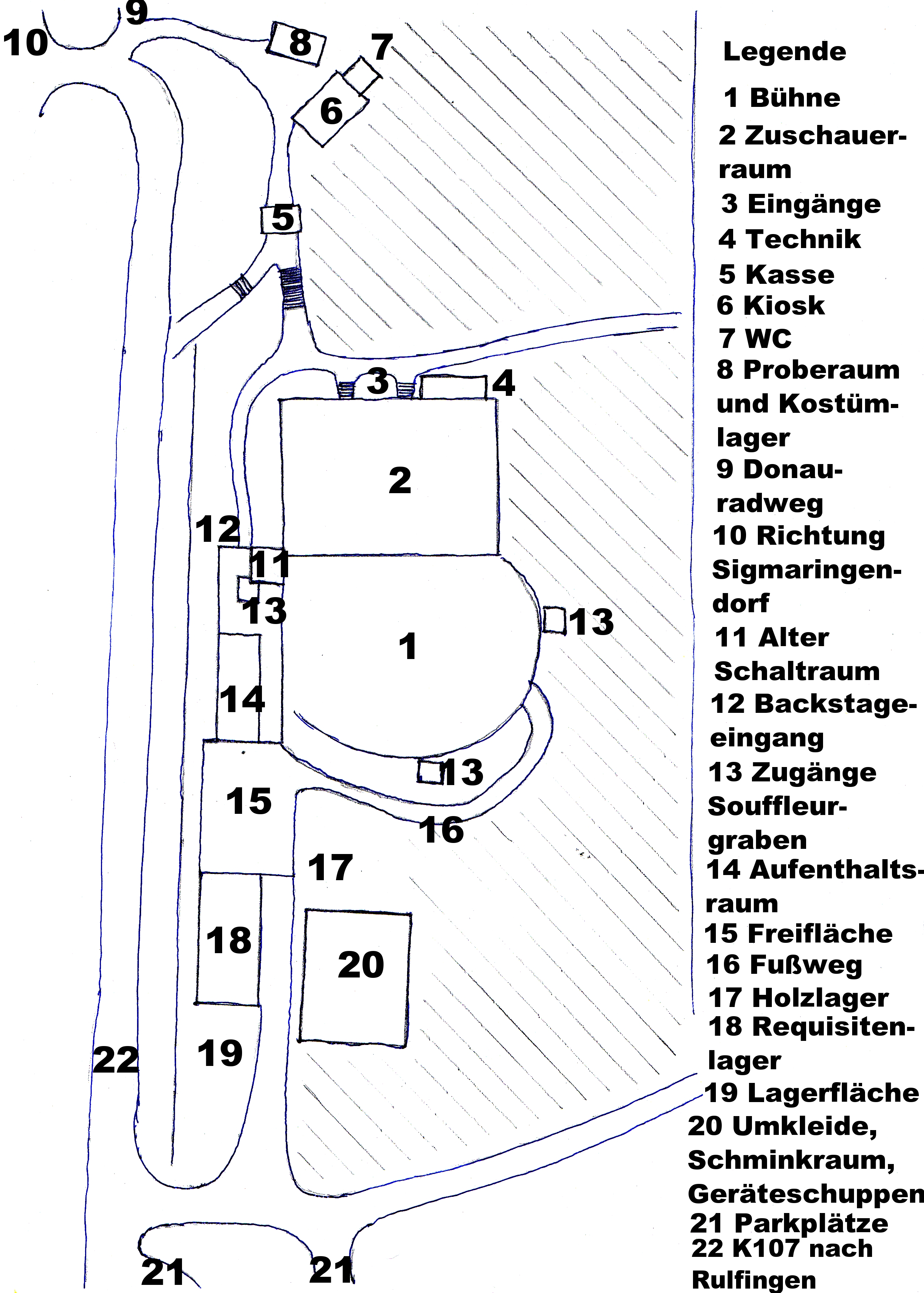 Lageplan der Waldbühne Sigmaringendorf